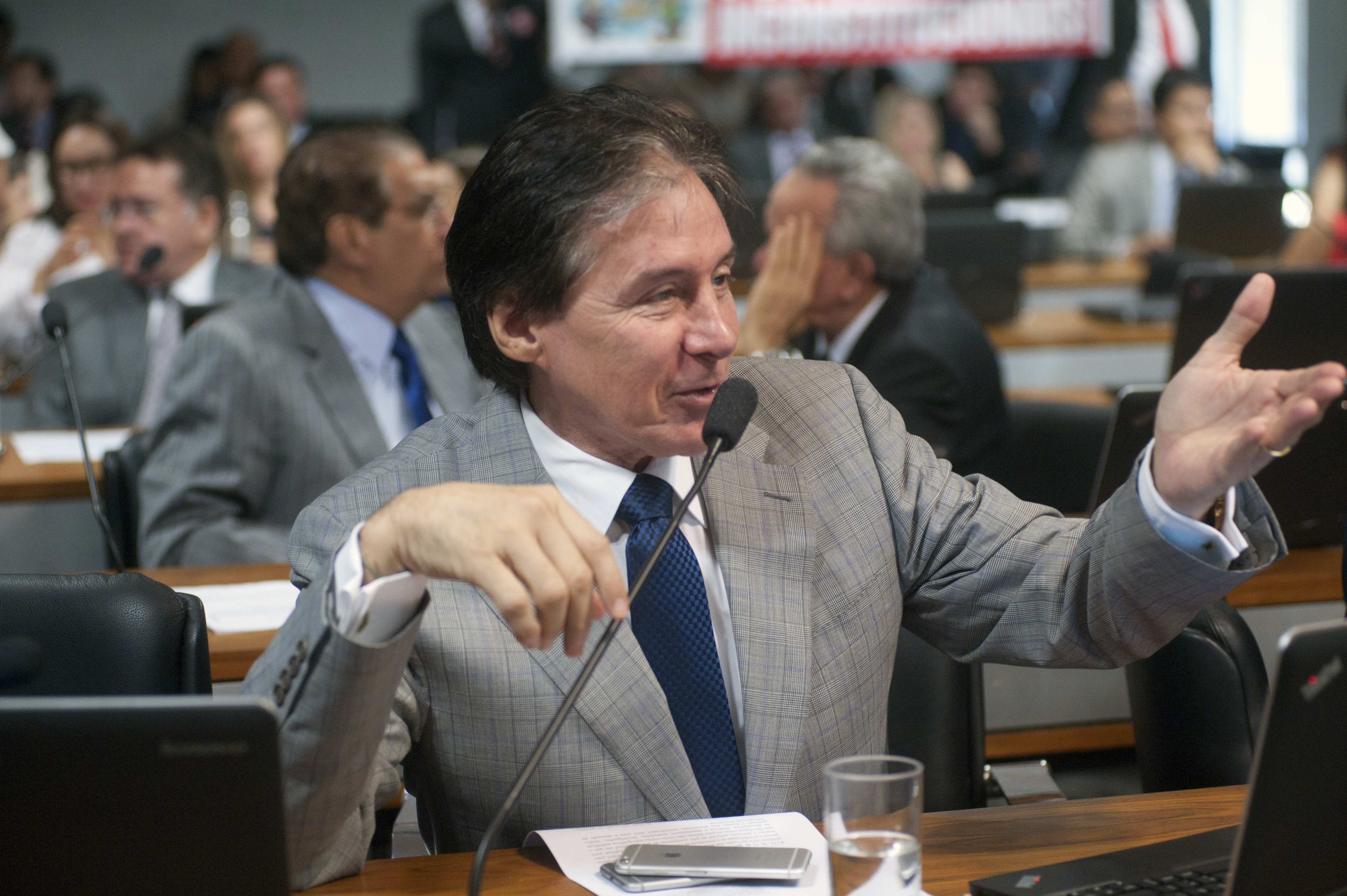 Comissão de Constituição, Justiça e Cidadania (CCJ) realiza reunião deliberativa com 38 itens. Entre eles, a PEC 62/2015 que impede o "efeito cascata" no reajuste de remunerações de agentes públicos, e a PEC 76/2011, que assegura aos índios a participação nos resultados do aproveitamento de recursos hídricos em terras indígenas. Em pronunciamento, senador Eunício Oliveira (PMDB-CE). Foto: Pedro França/Agência Senado